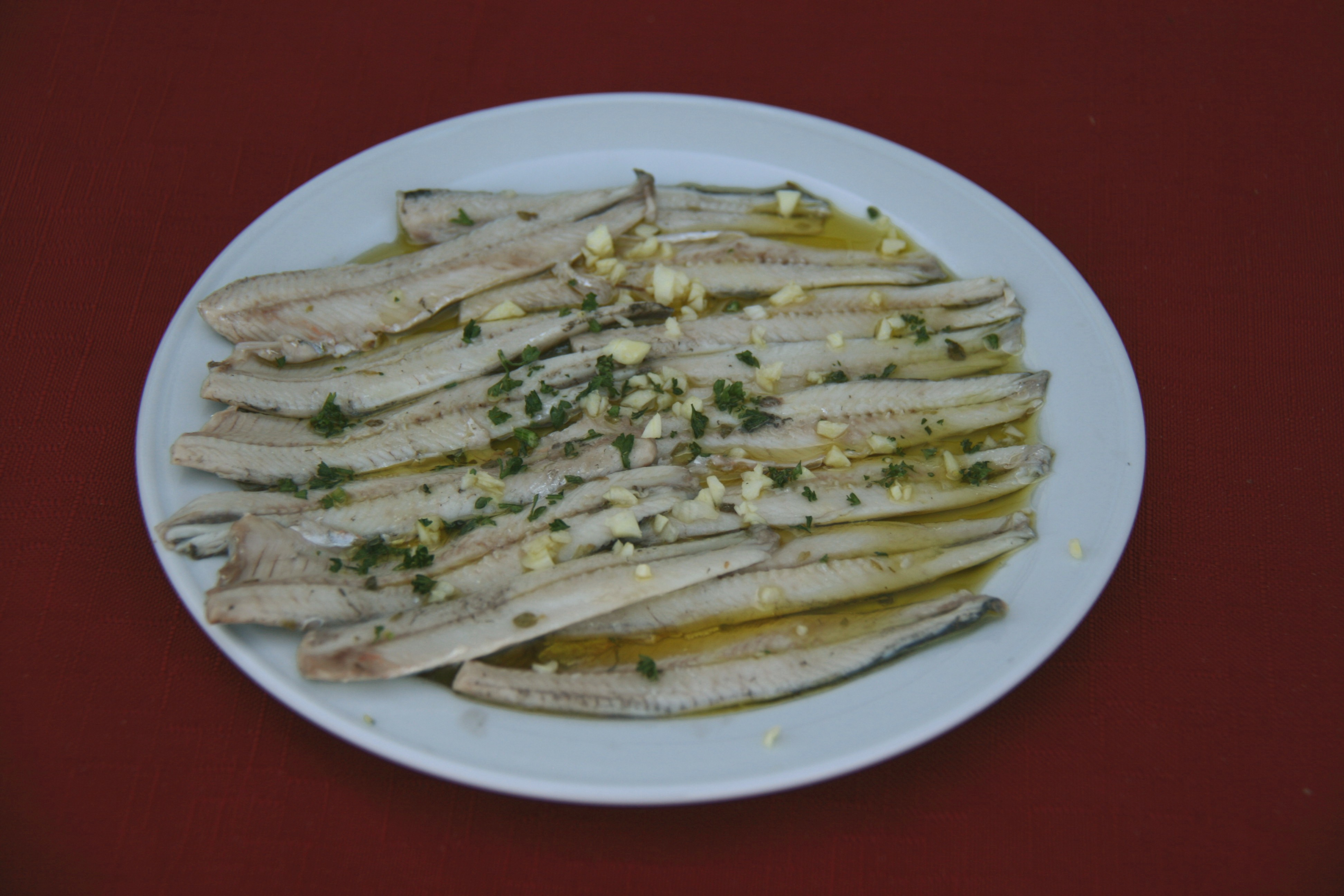 Plato de anchoas en vinagre